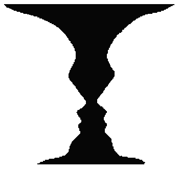 Optický klam, umožňuje dvojí výklad. Díváte se na pohár nebo na dvě tváře.